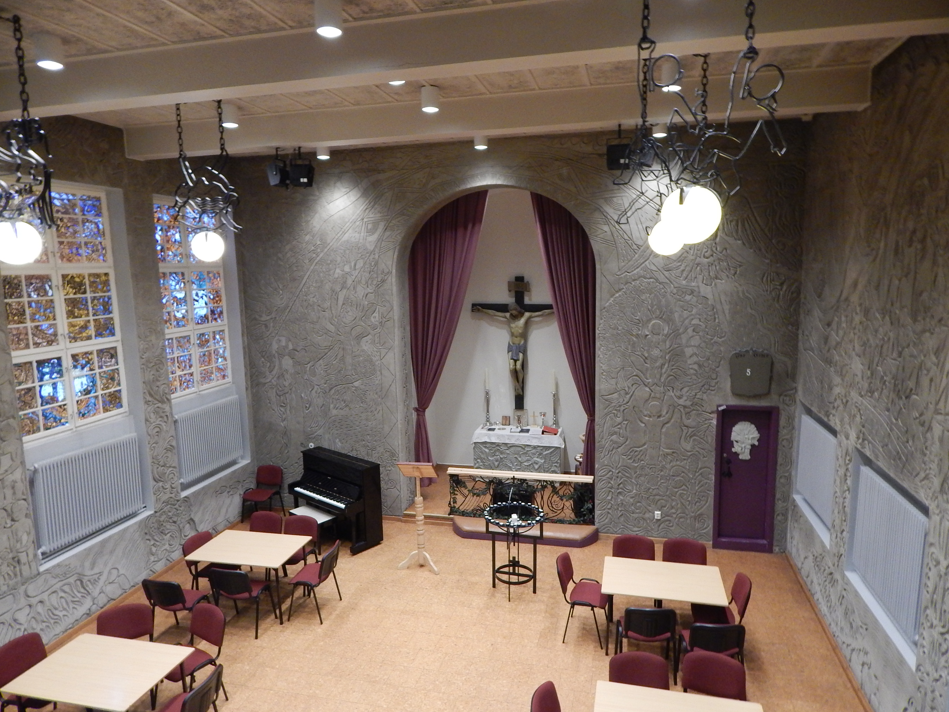 Ilebu fengselskapell, utsmykket av Alexey Zaitzow i 1948